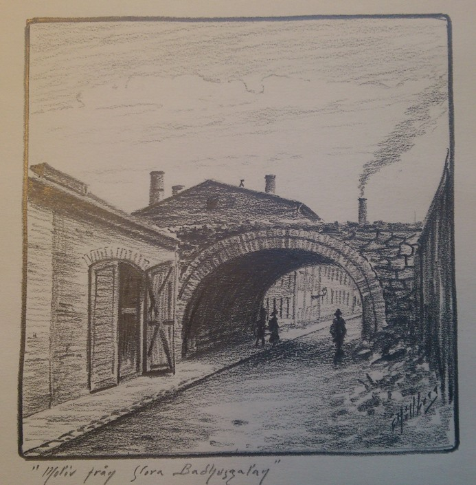 Kolteckning av Einar Hillberg föreställande Stora Badhusgatan i Göteborg